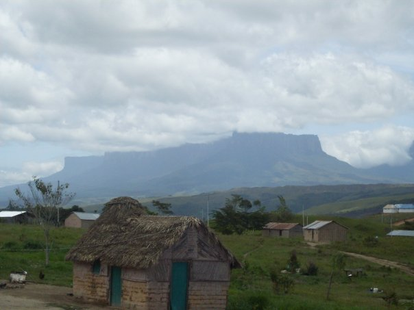 Roraima